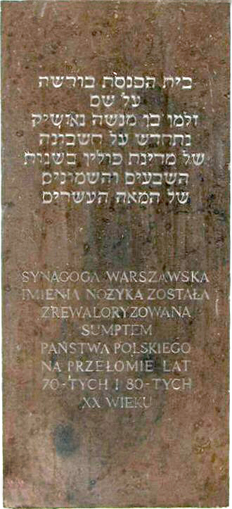 Tablica pamiątowa w synagodze Nożyków. Grafikę wyprostował User:Hiuppo